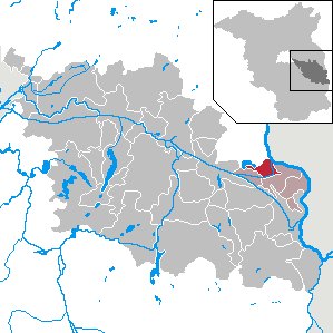 Brieskow-Finkenheerd in Brandenburg (Country) - District Oder-Spree